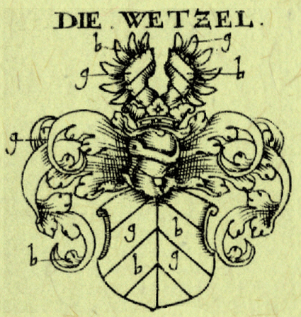 Wappen Wetzel (Schwäbisch Hall): Von Blau und Gold gegengesparrt bzw. gespalten, vorne dreimal von Blau und Gold schräglinksgeteilt, hinten von Gold und Blau schrägrechtsgeteilt. Helmzier ein wie der Schild bez. Adlerflug. Helmdecken blau-golden.